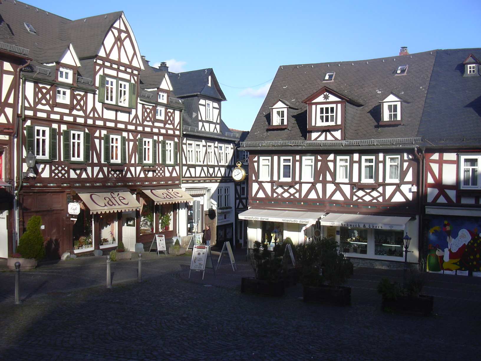 Braunfels market place